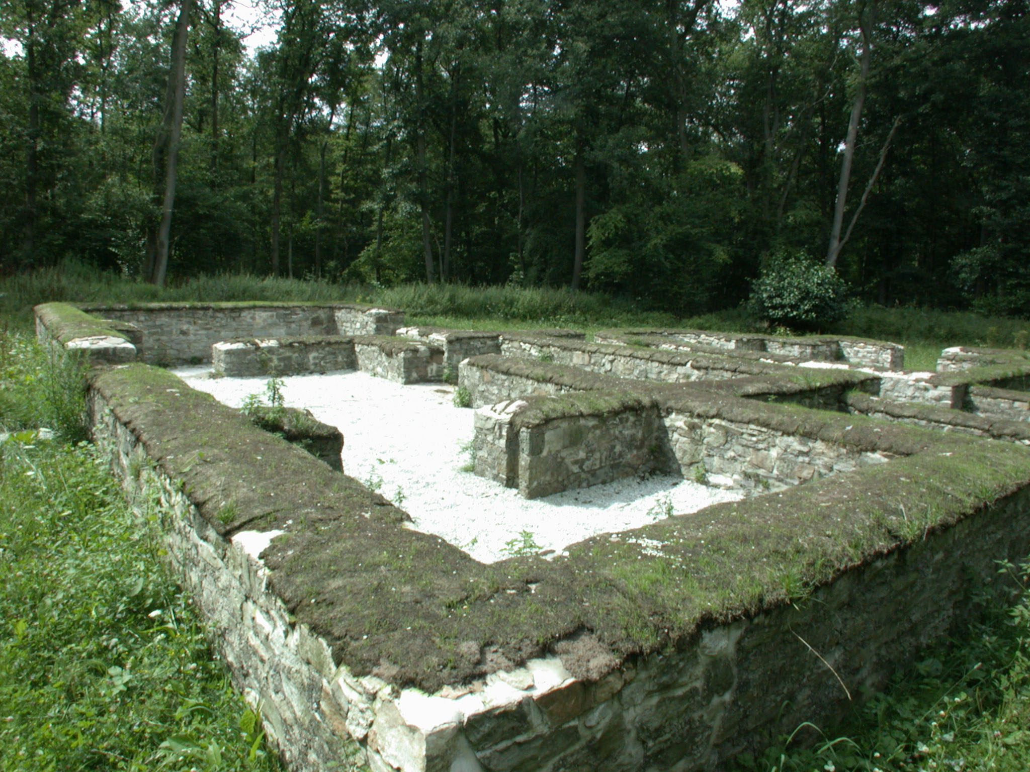 Badehaus Limeskastell Kapersburg, Wehrheim-Pfaffenwiesbach, Deutschland